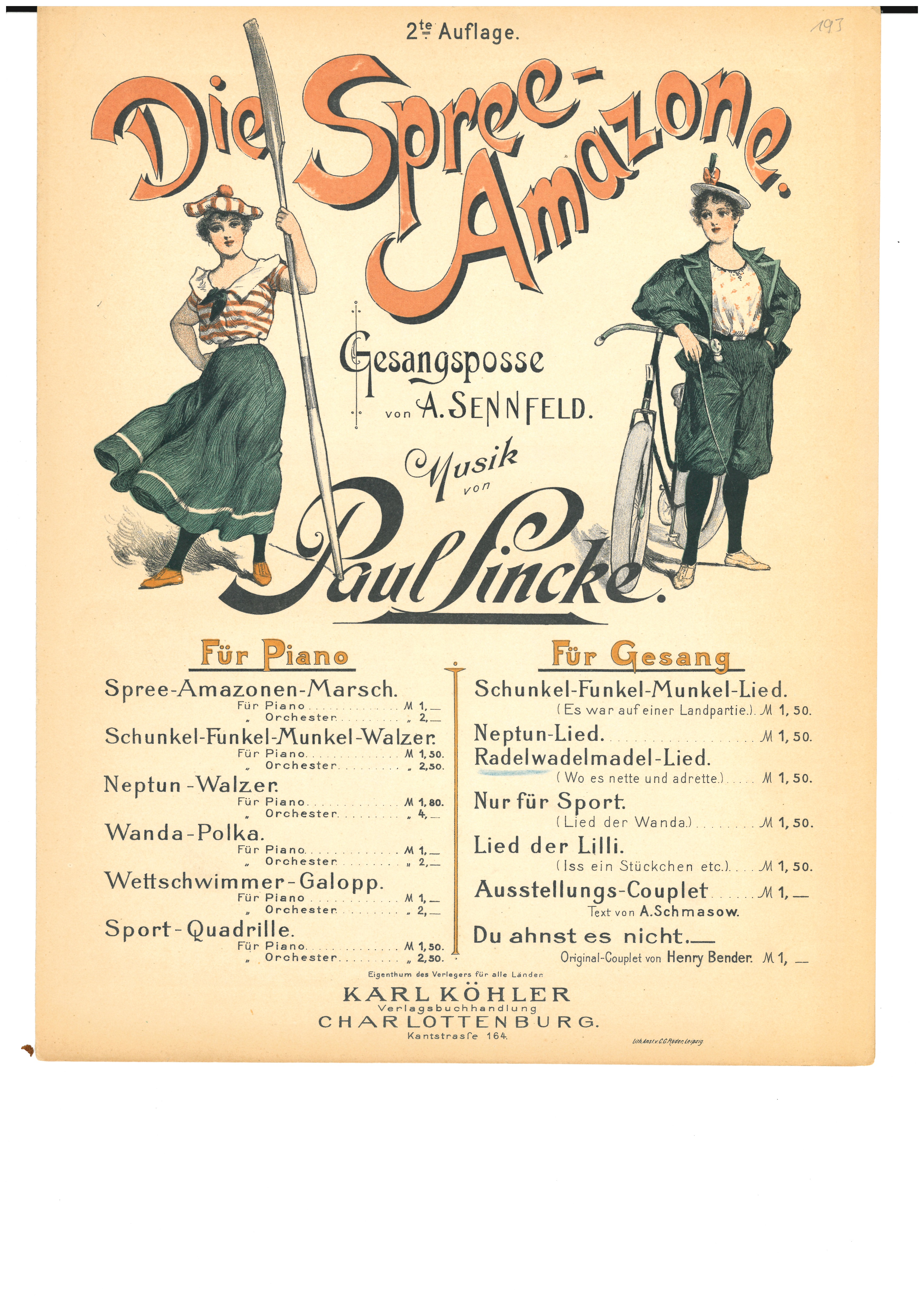 Posse: ,Die Spree-Amazone', 2. Auflage o. D. [um 1896] (Klavier), Karl Köhler, Verlagsbuchhandlung Charlottenburg, Nr. 57 (Bl. 193-195)